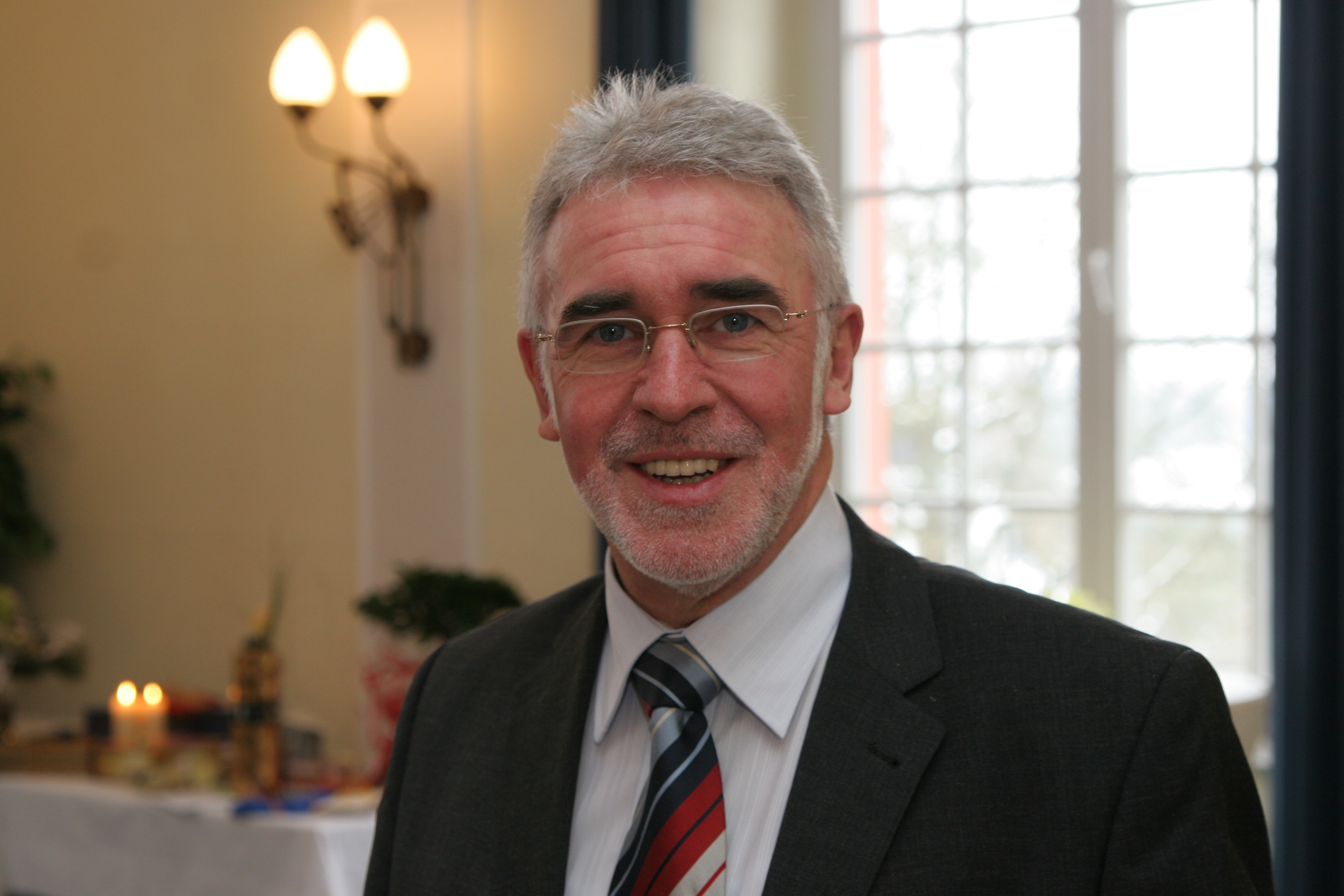 Horst Afflerbach, evangelischer Theologe und Leiter der Biblisch-Theologischen Akademie Wiedenest, bei einem Empfang am 6. Dezember 2011 in Wetzlar